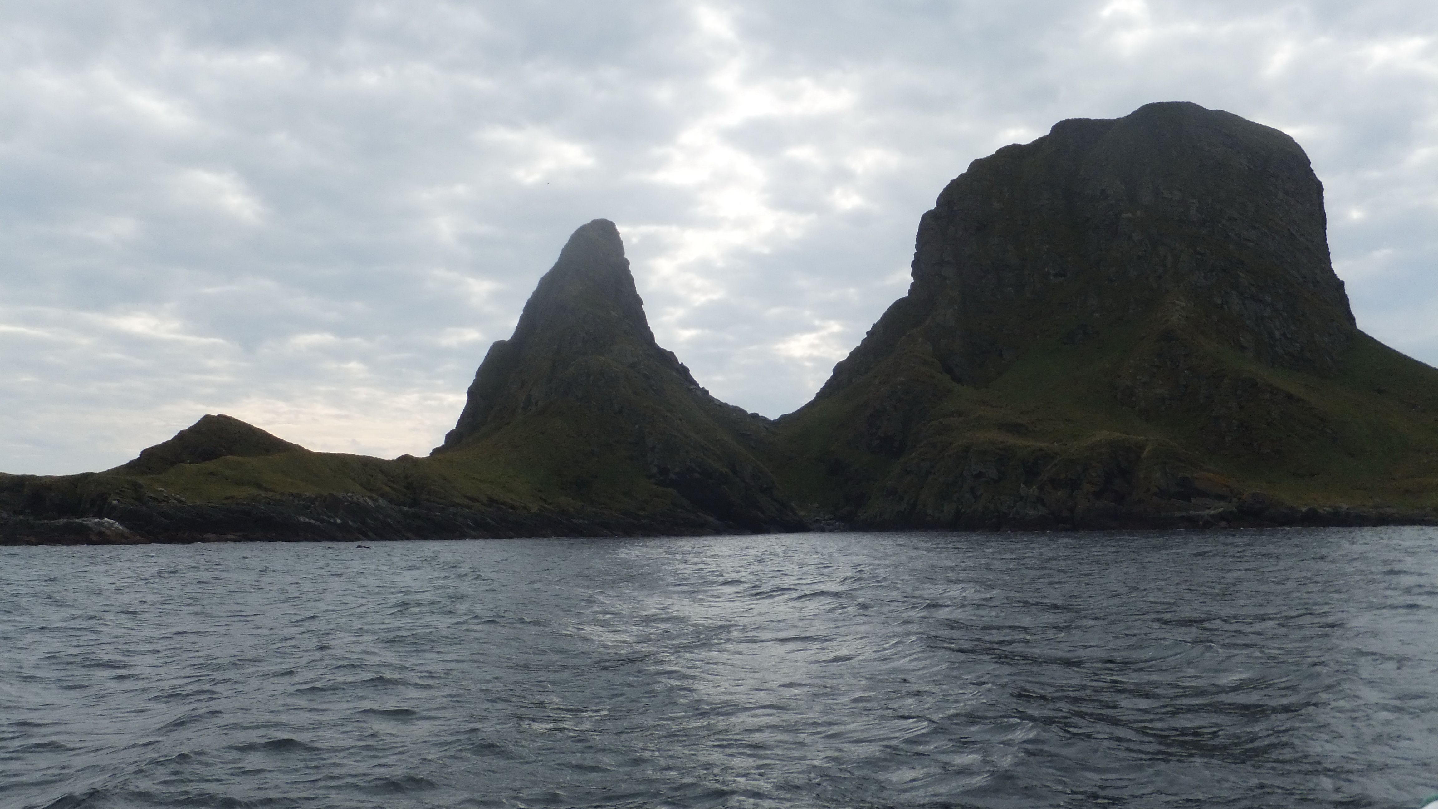 Røst bird islands, Trenyken .au/writer/calling-on-kittelsen-skomvaer-l...